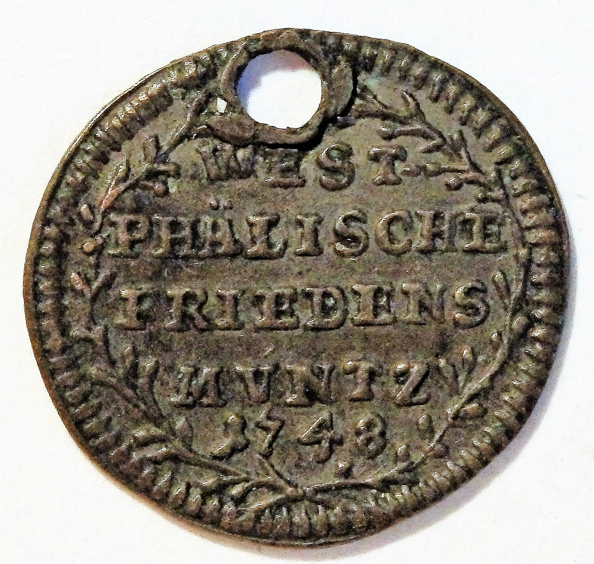 Silbermedaille auf 100 Jahre Westfälischer Friede (Jahr 1748)